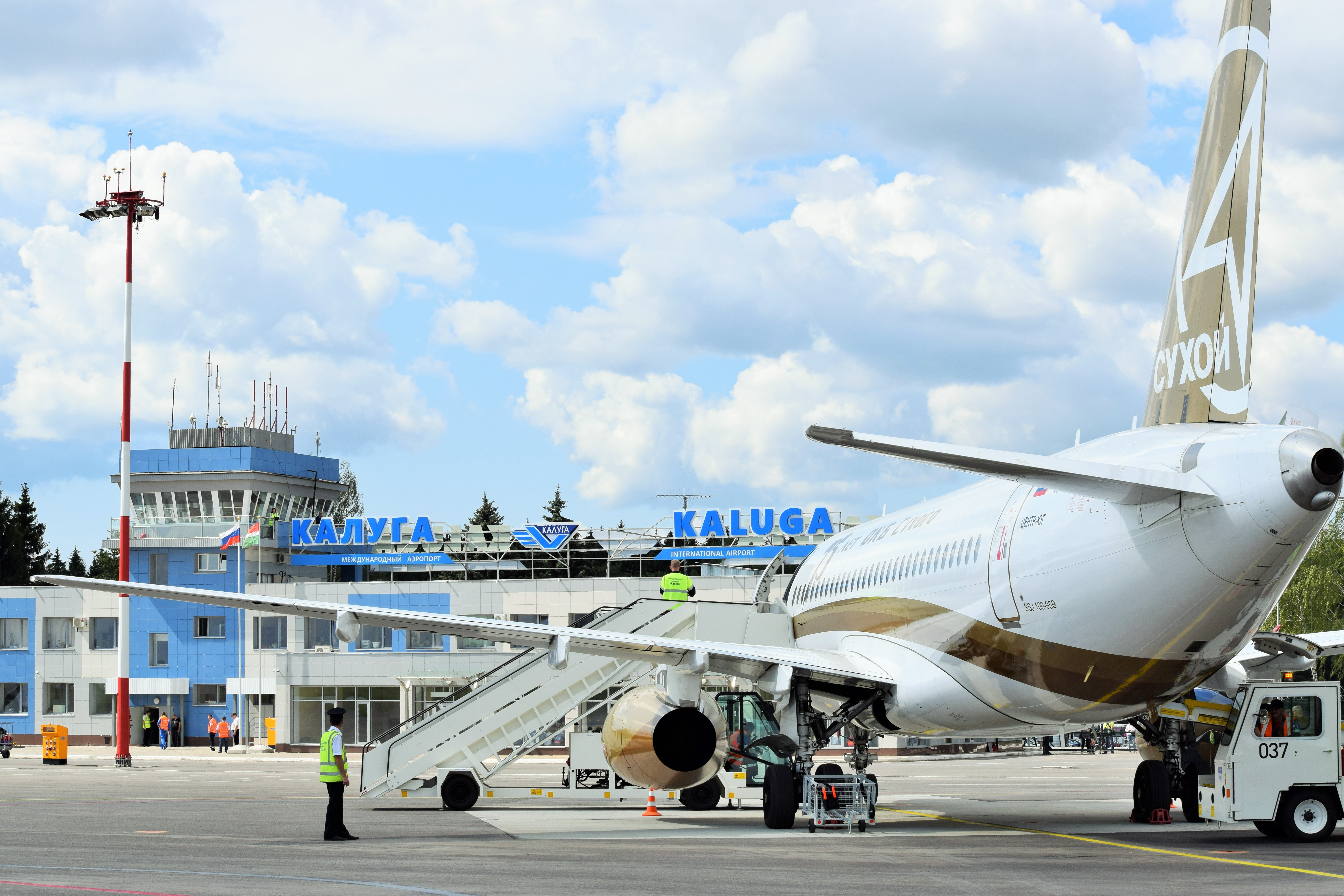 Аэропорт Калуга